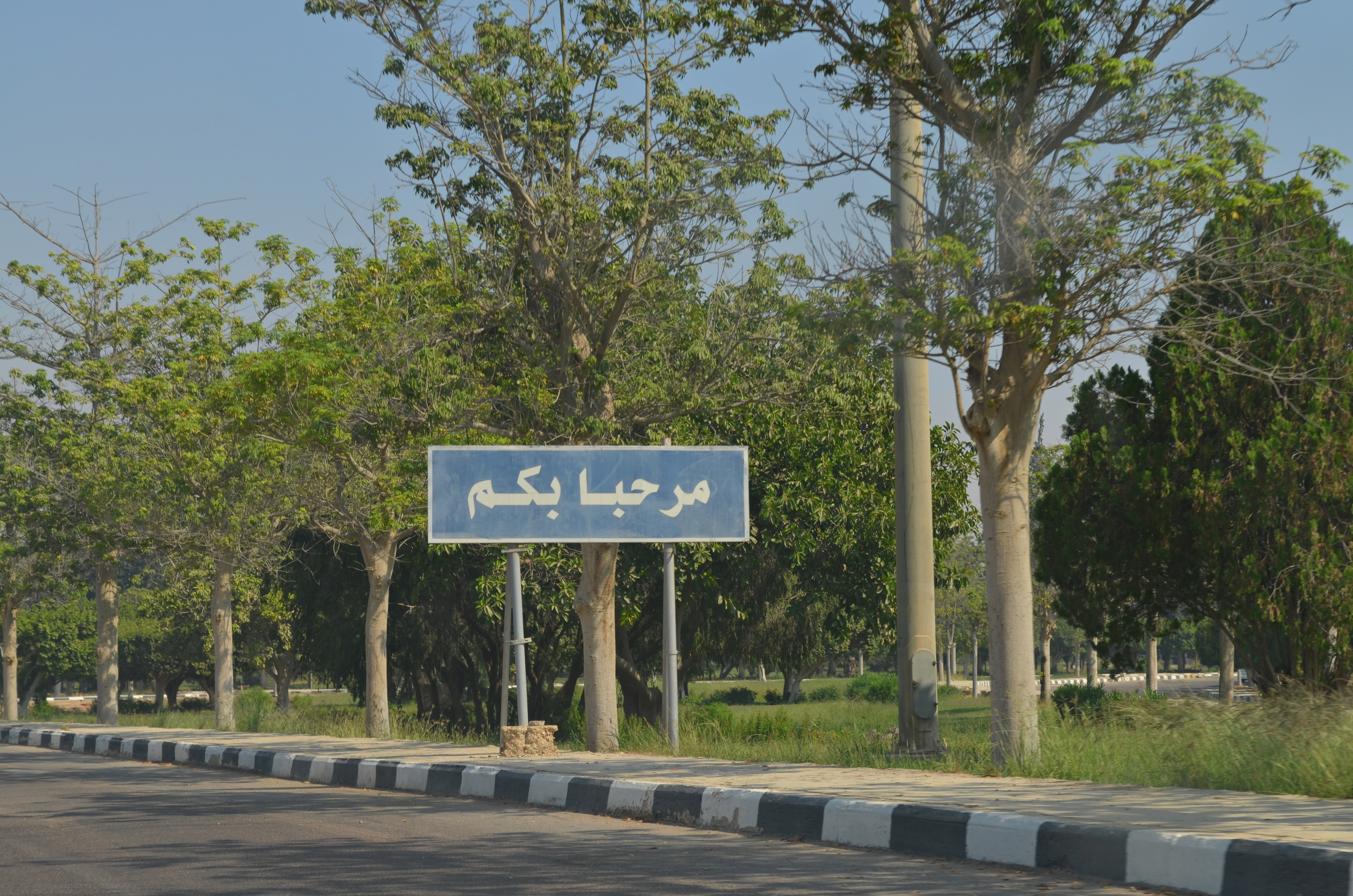 مرحباً بكم، لافتة بمدينة السادات، مصر